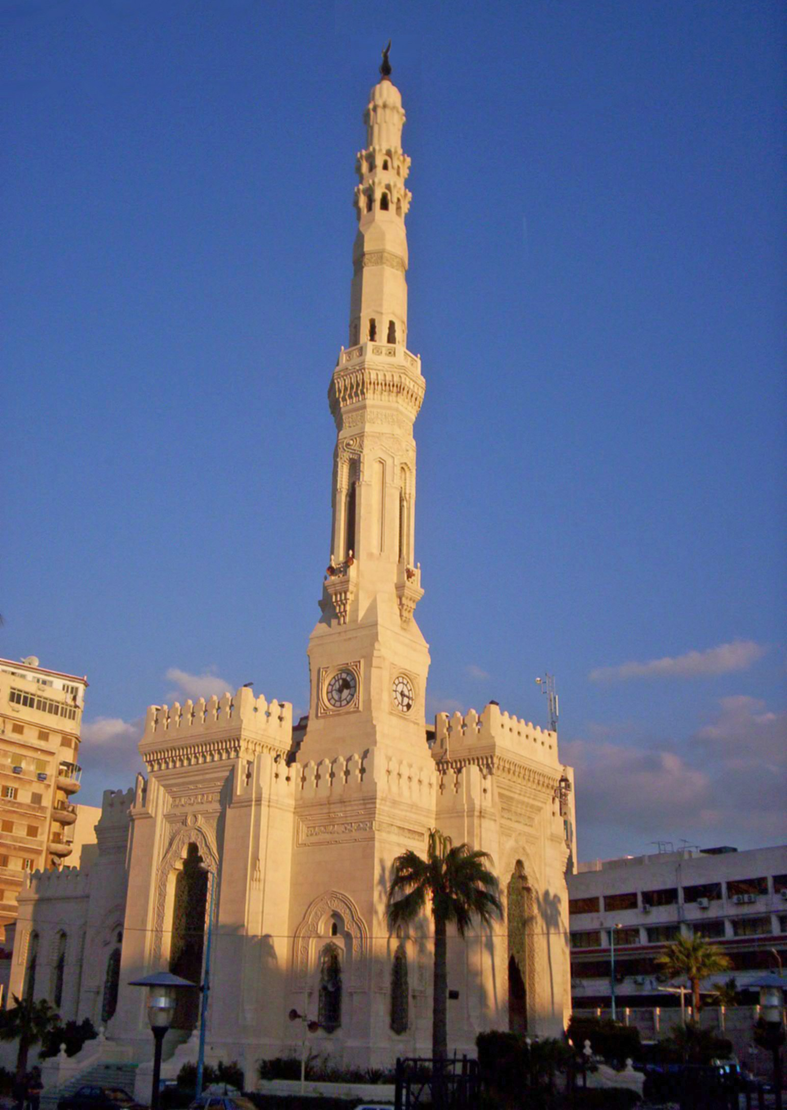 لقطة شمالية غربية North western view